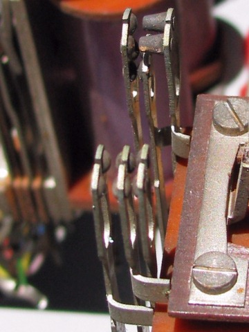 Umschalte- und Folgeumschaltekontakt eines Flachrelais